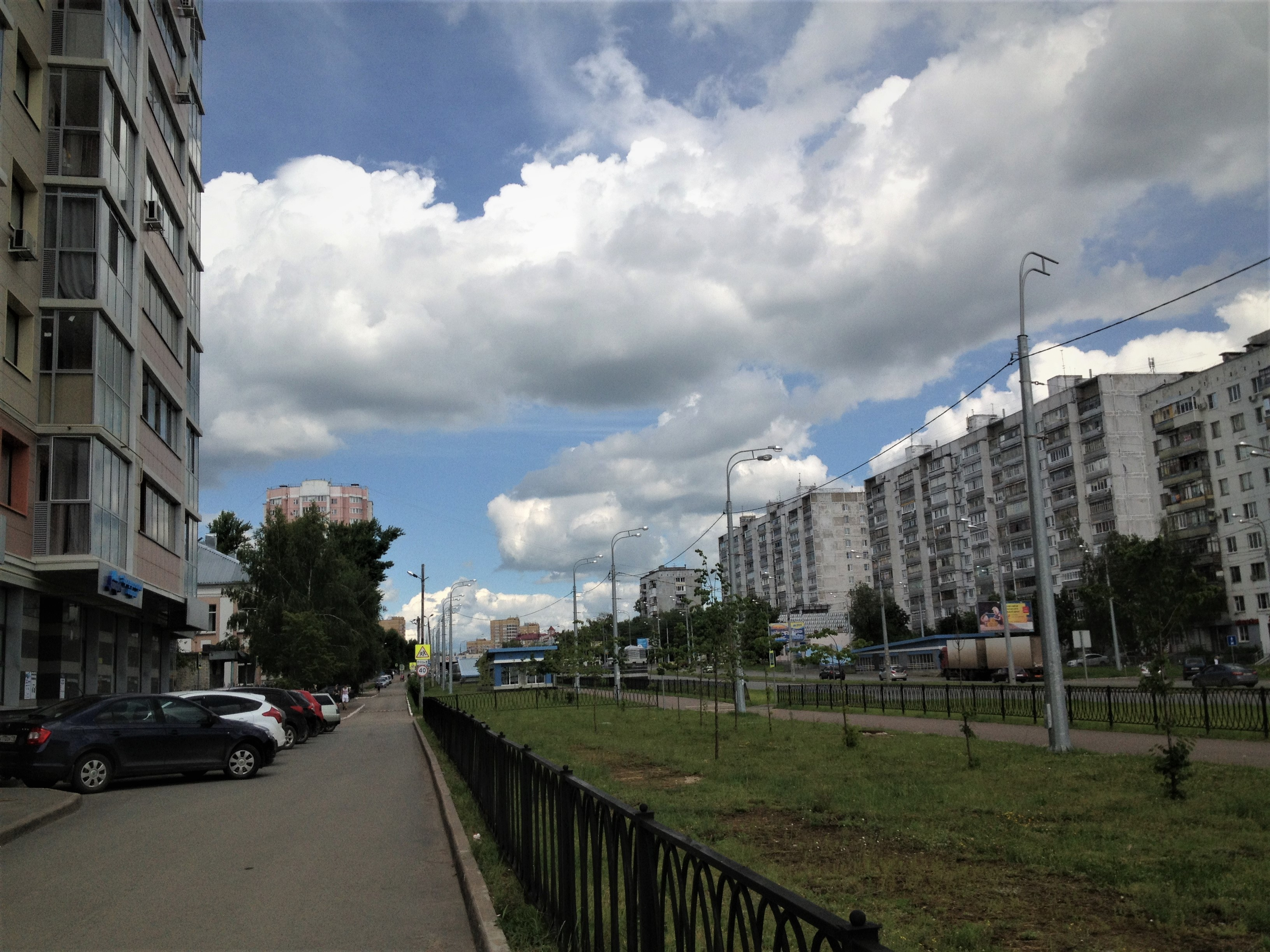 Улица Копылова на участке от пересечения с улицей Олега Кошевого до пересечения с улицами Побежимова / Ленинградской (г. Казань).